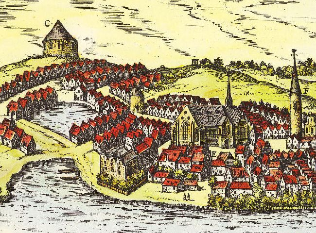 Den Høje Port i Slesvig by